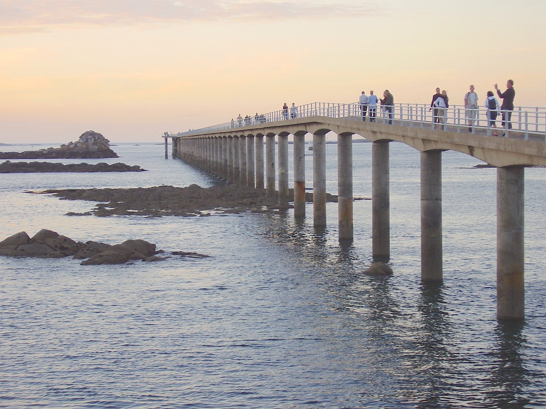 Roscoff, Bretagne; Frankreich